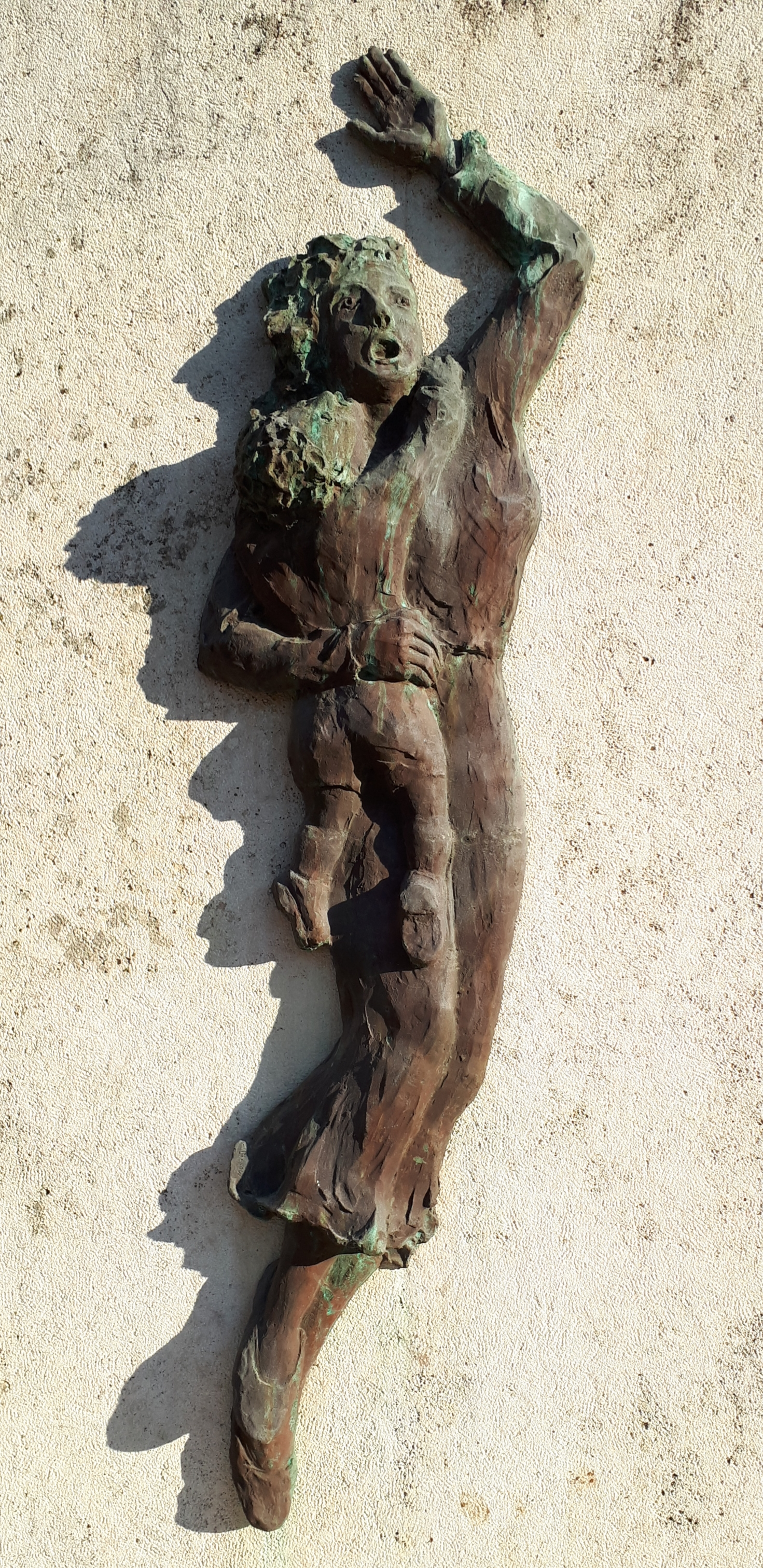 Monumento ai caduti, dettaglio